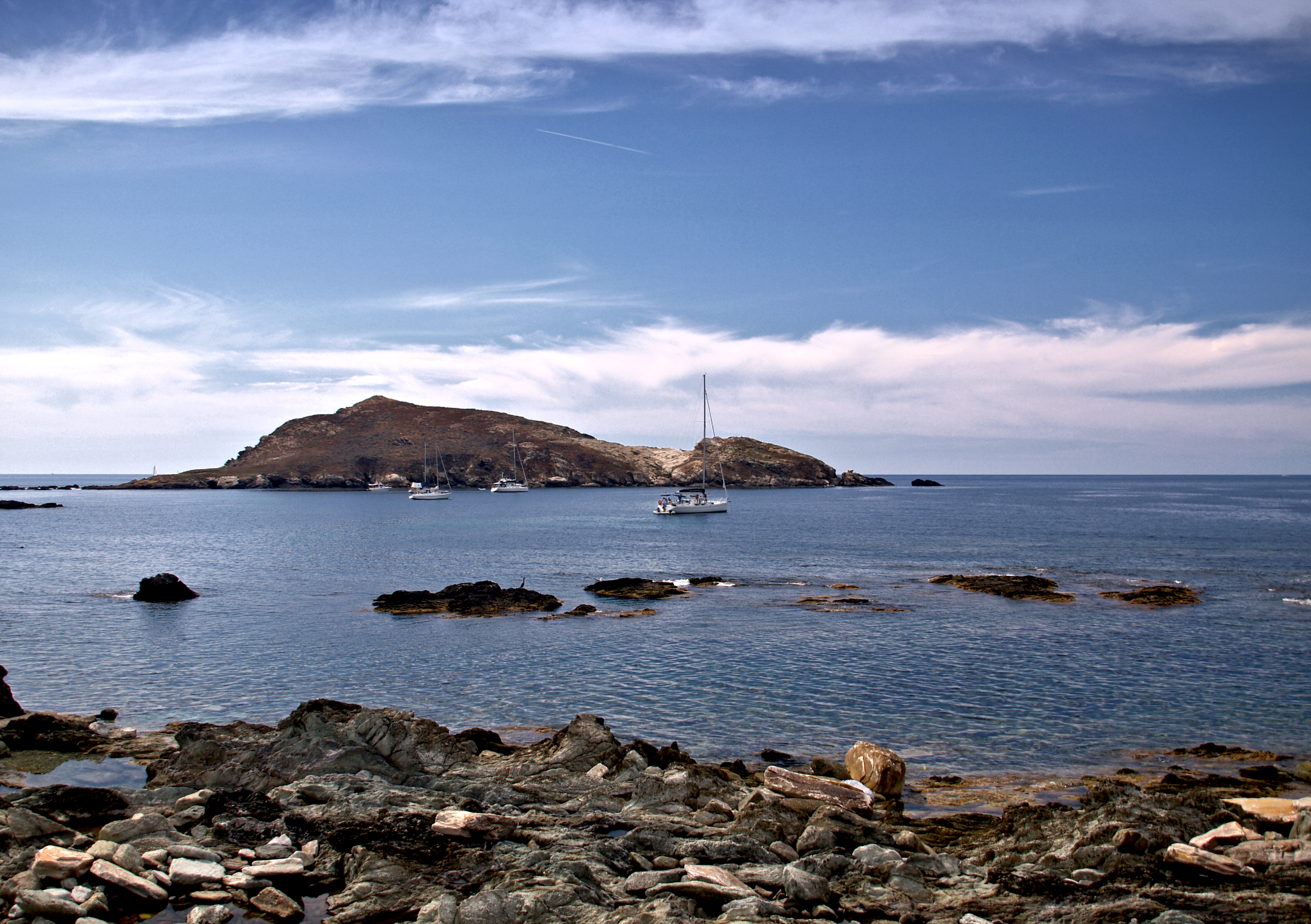 Centuri (Corsica) - Îlot de Capuse